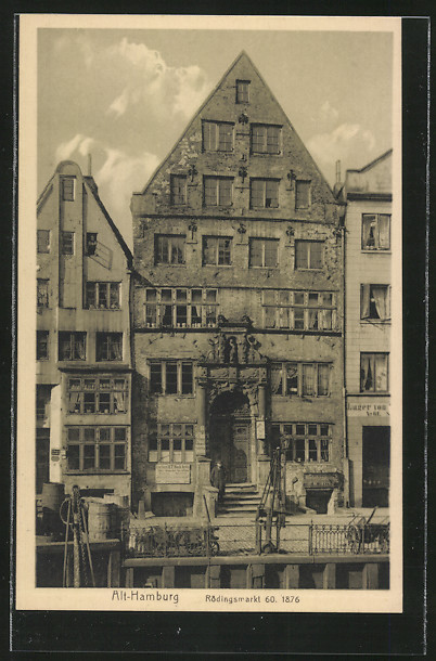 Haus "Haus Rödingsmarkt 60" in Hamburg